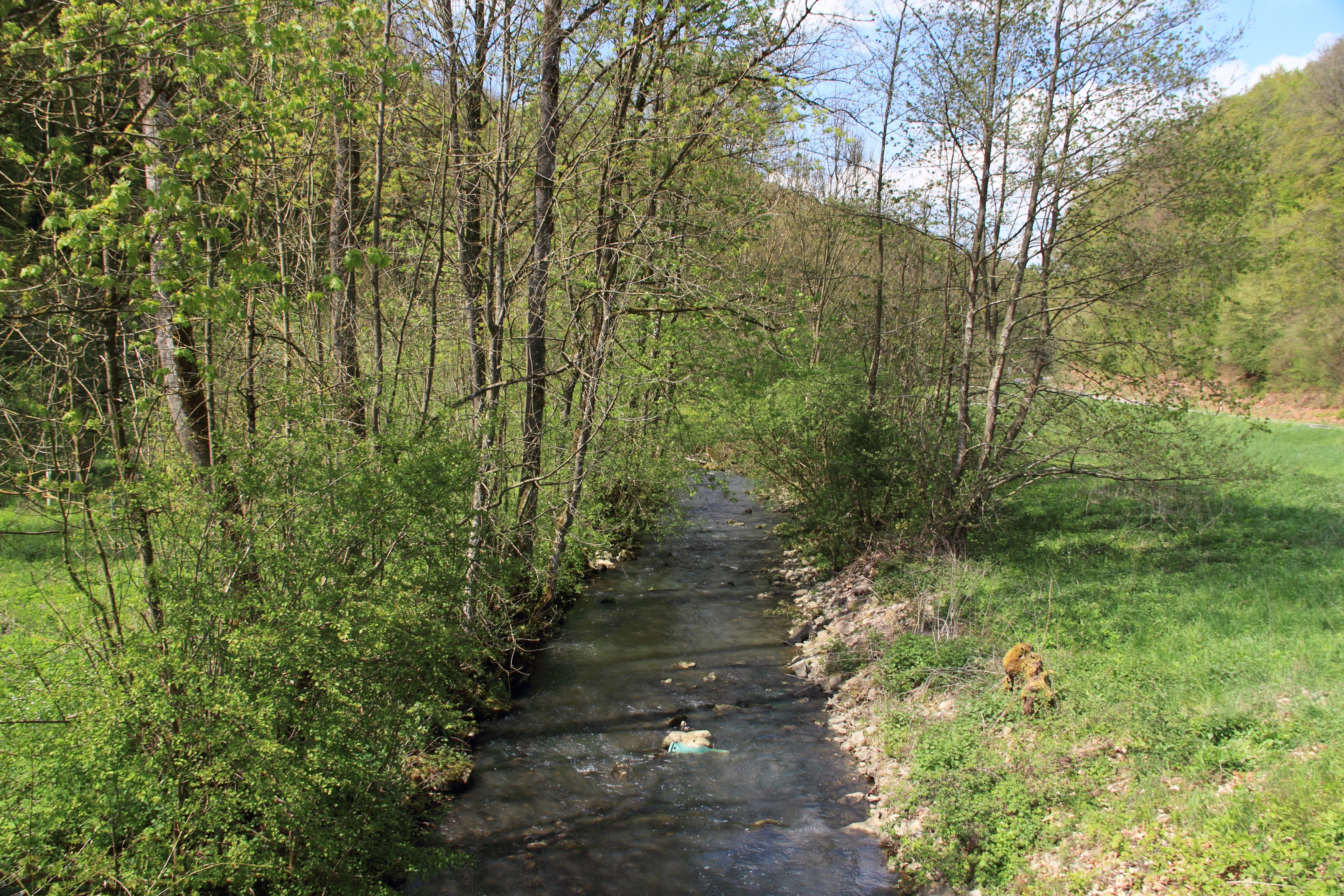 Der Herrgottsbach auf dem Gemeindegebiet der Stadt Creglingen ist ein linker Zufluss der Tauber.